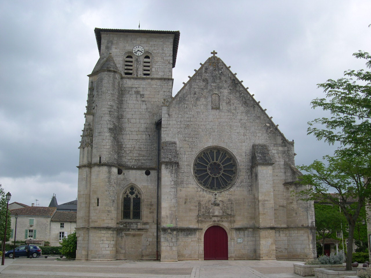 Église Saint-Germain de Magné, (Classé, 1913) .